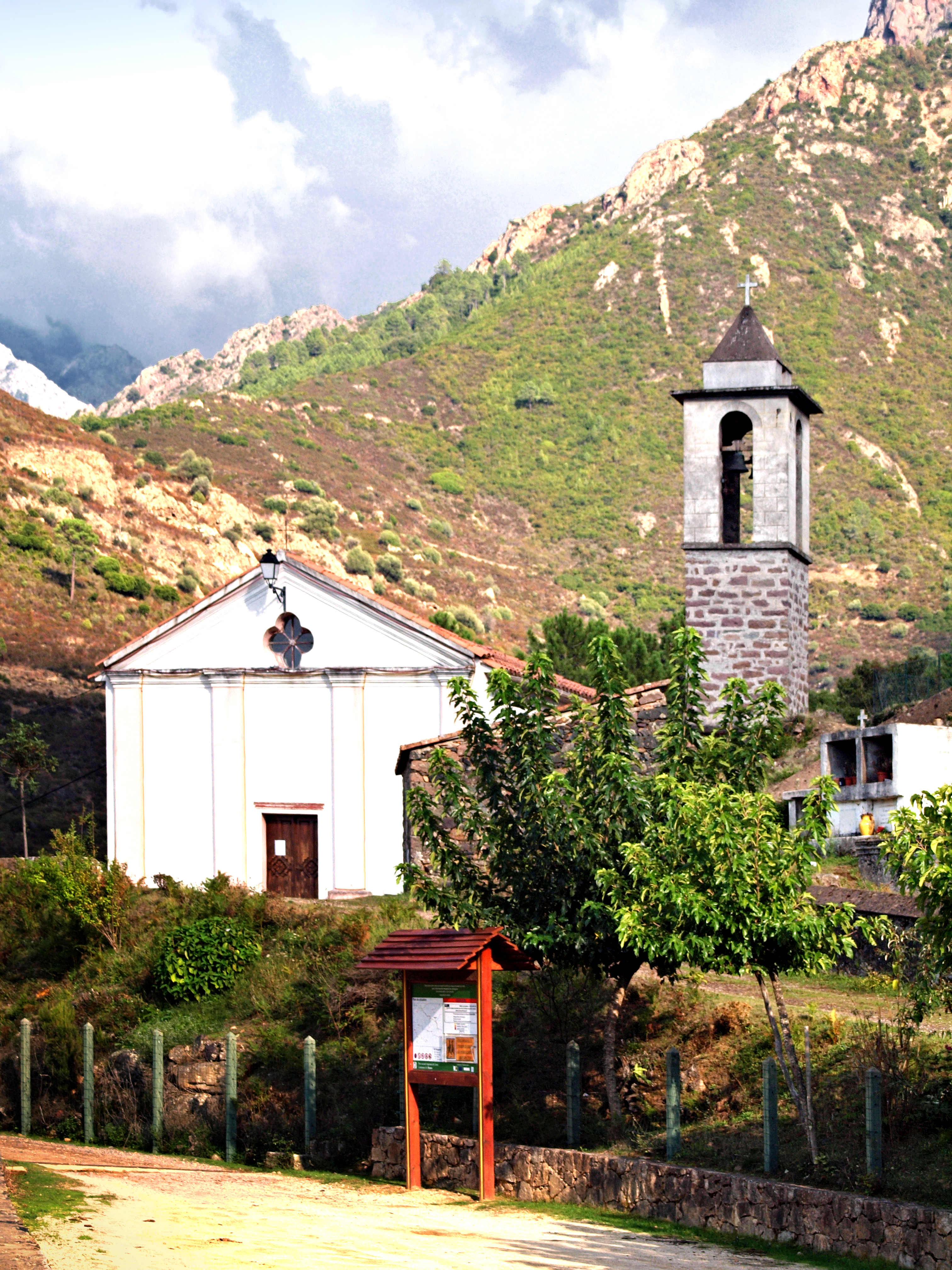 Manso (Corsica) - Église Saint-Pancrace